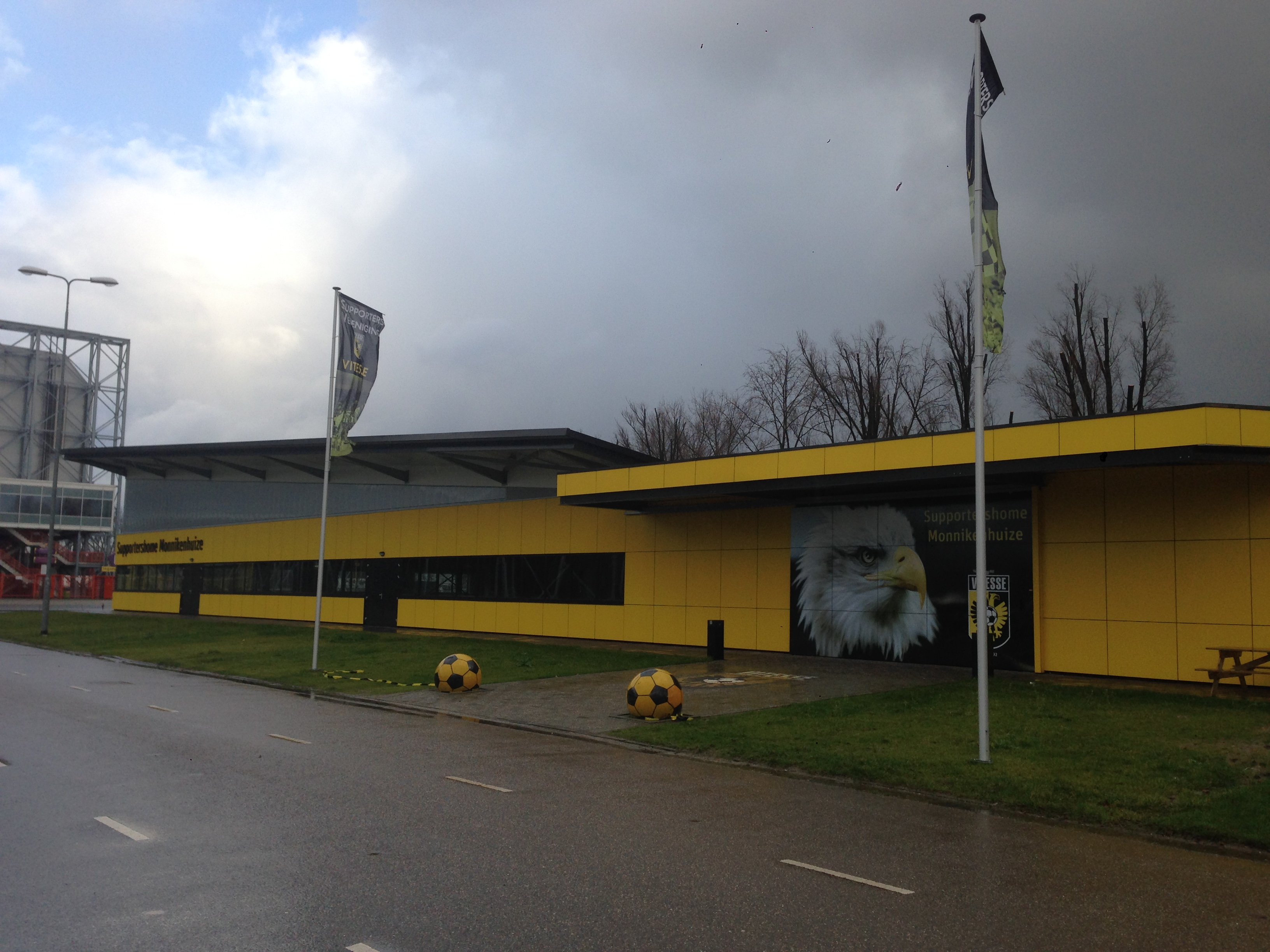 Supportshome Monnikenhuize van Vitesse